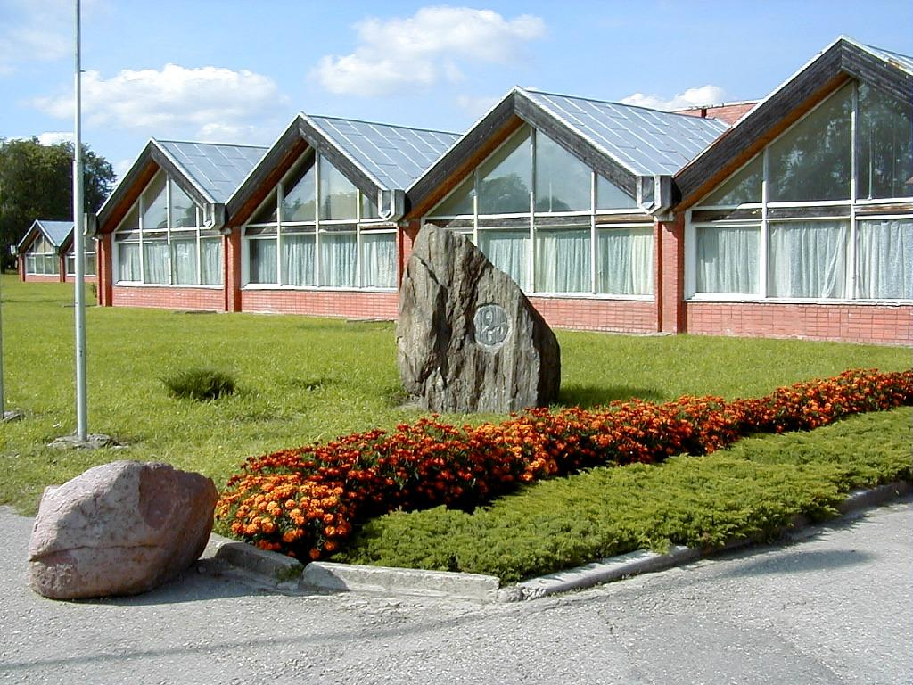 Slampe, Zemgales vidusskola 2000-09-02